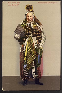 Postkarte I.Biss Figur der Rottweiler Fasnet um 1900